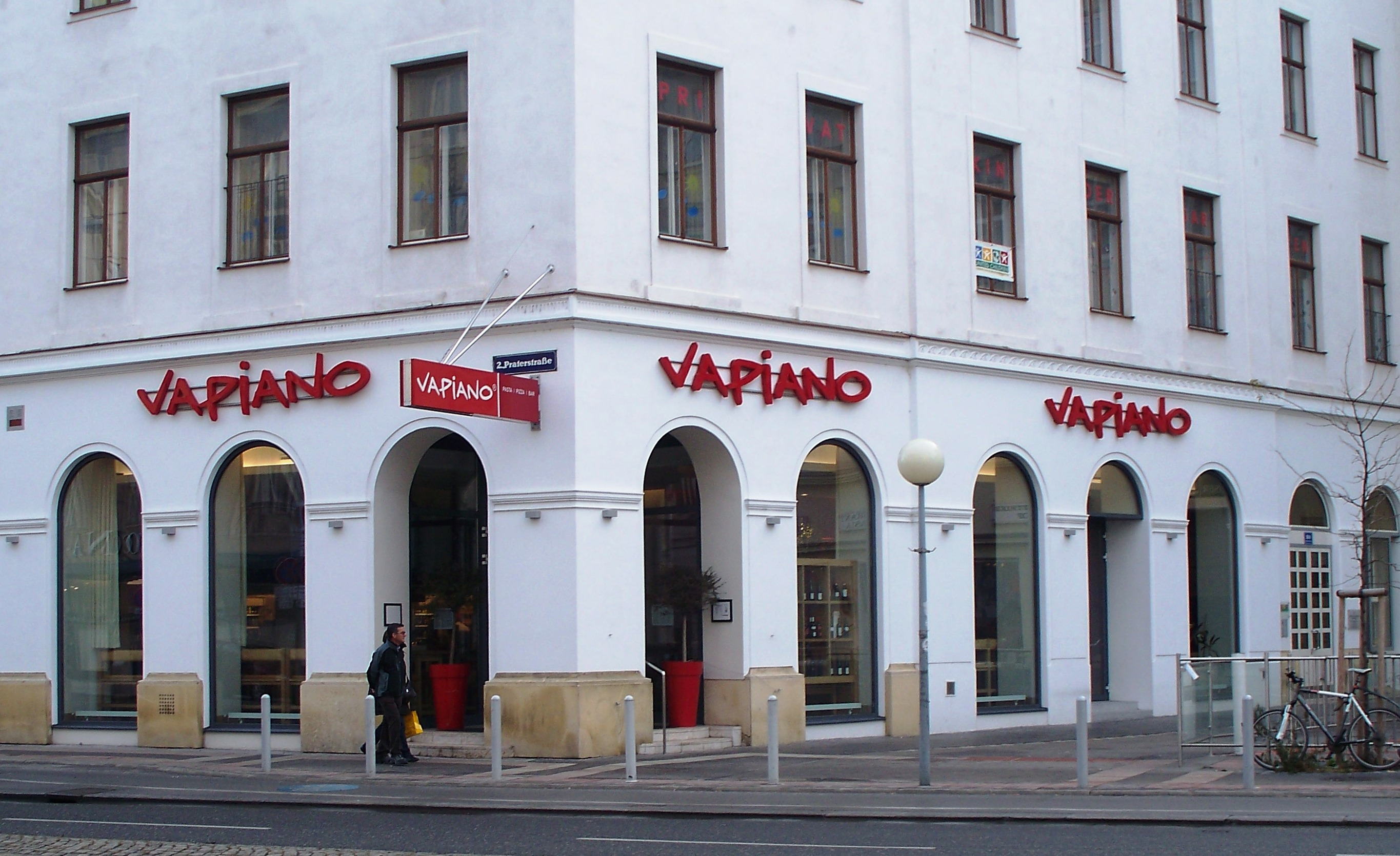 Ein Vapiano Restaurant in Wien im 2. Bezirk, Praterstraße (Leopoldstadt).